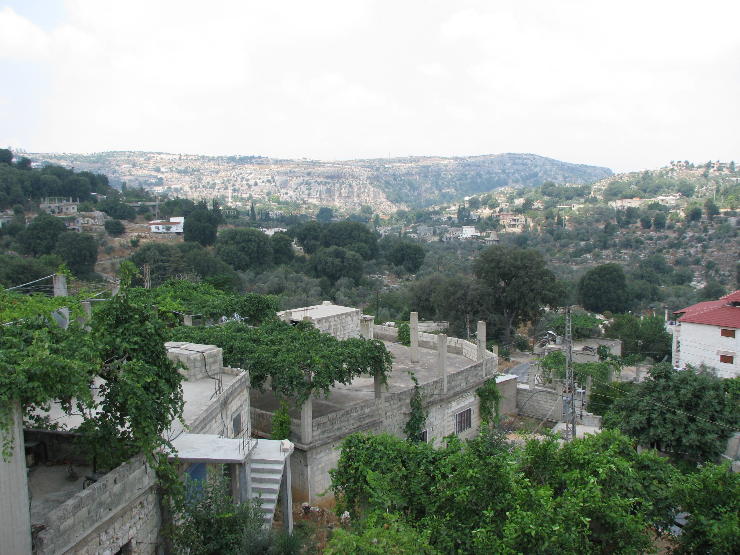 منظر لبيت ياشوط، وتبدو فية أشجاز السنديان العملاقة، الصورة من قرية حراما.